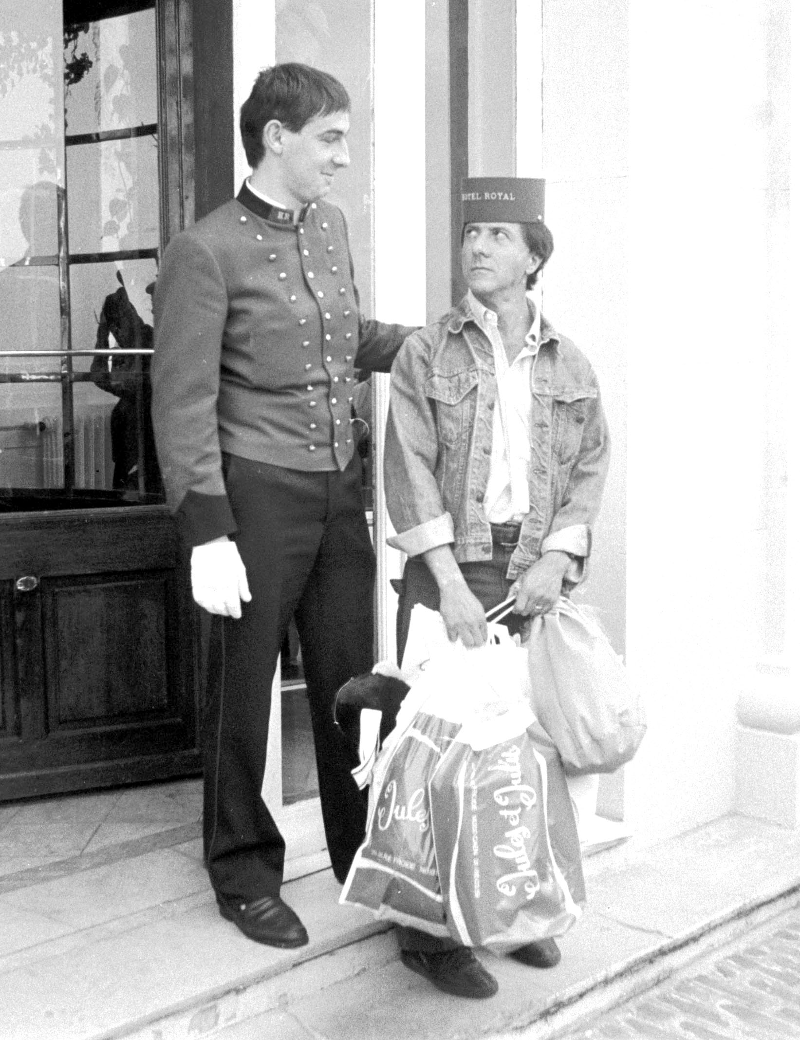 L'acteur américain Dustin Hoffman au Festival du cinéma américain de Deauville (Normandie, France) en septembre 1985.